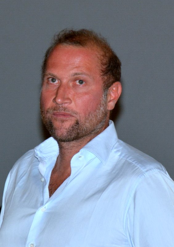 François Damiens à l'avant-première de "La famille Bélier"